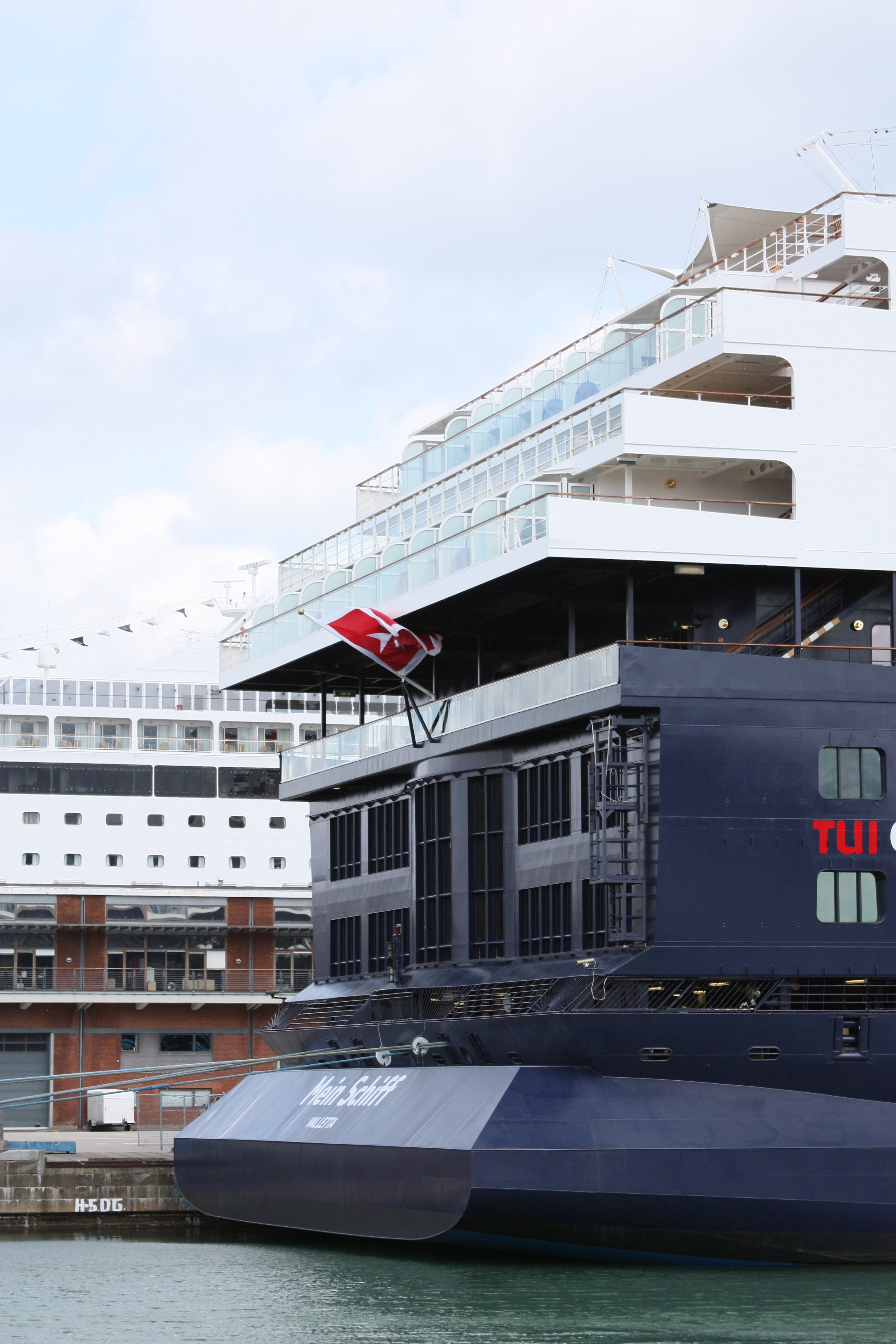 Mein Schiff, Valletta, des Reiseveranstalters TUI in Kopenhagen, 2009, Heck mit Duck-Tail.